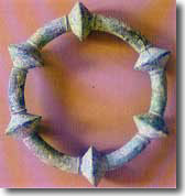 uno degli anelloni custoditi nel museo archeologico di Ripatransone.